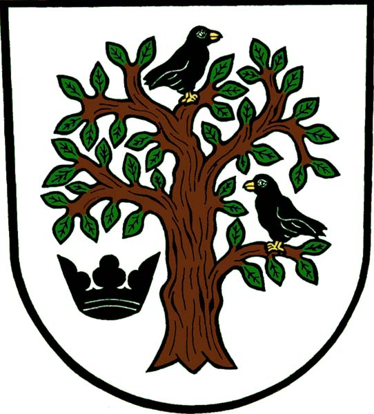 Znak obce Krasov